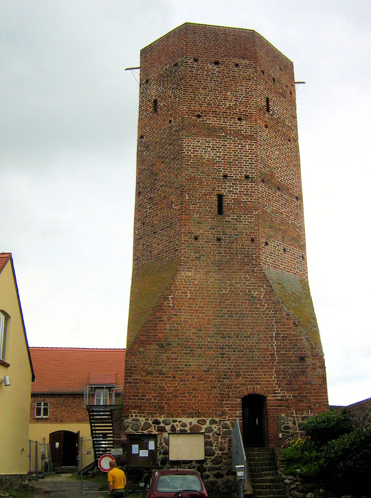 Blick auf den Bergfried der Burg Löcknitz im pommerschen Städtchen Löcknitz.